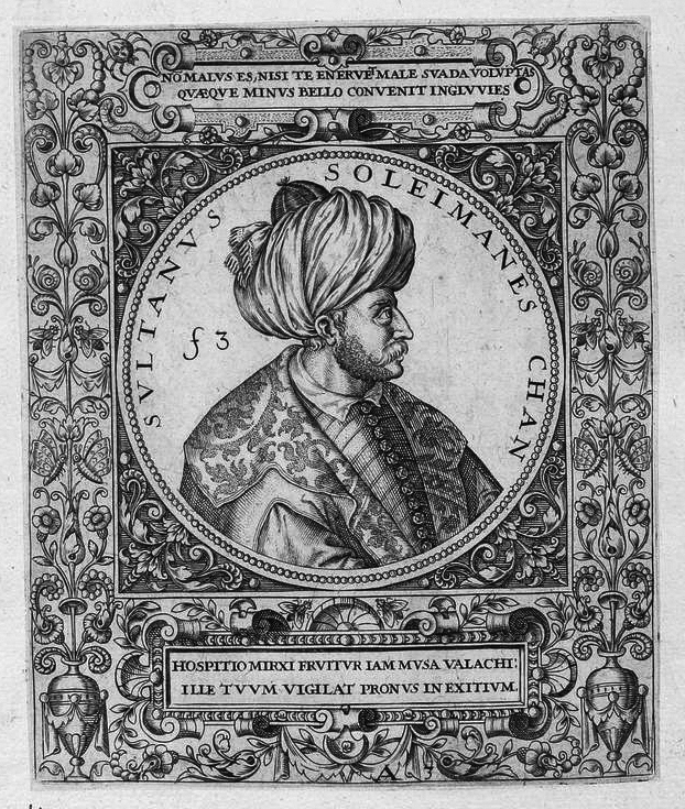 Grafik aus dem Klebeband Nr. 1 der Fürstlich Waldeckschen Hofbibliothek Arolsen Illustration aus: Georg Greblinger: Wahre Abbildungen der Türckischen Kayser vnd Persischen Fürsten / so wol auch anderer Helden und Heldinnen von dem Osman / biß auf den andern Mahomet. Johann Ammon, Frankfurt 1648 Motiv: "Sultanus Soleimanes Chan" (= Süleyman Çelebi)